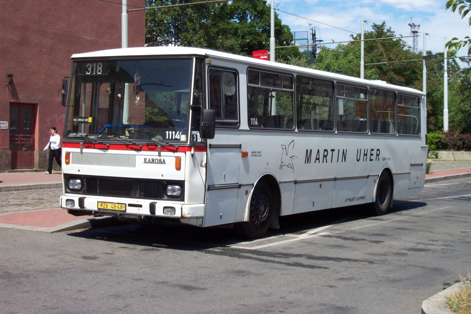 Autobus typu Karosa C 834 v roce 2004 v Praze, dopr. Martin Uher